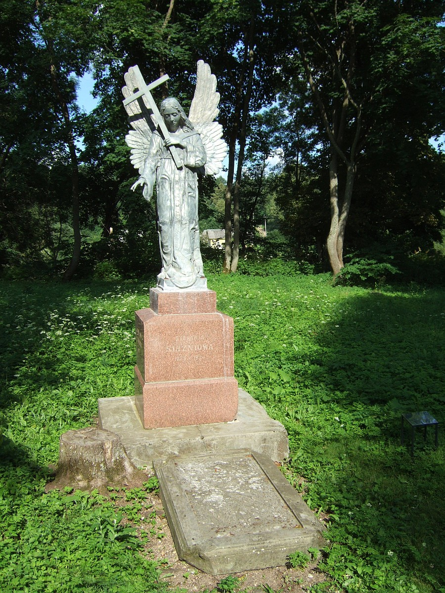 Liubavo dvaro skulptūra